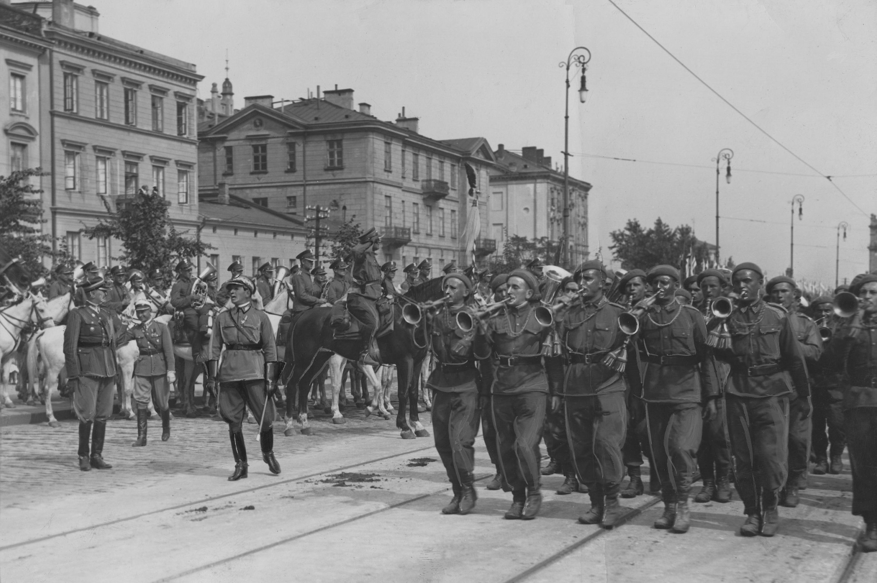 Powrót 1 Pułku Szwoleżerów i 21 Pułku Piechoty po manewrach do Warszawy 8 września 1932. Defilada 21 Pułku Piechoty przed gen. Bolesławem Wieniawą-Długoszowskim ( z lewej ze szpicrutą). Widoczne domy w al. 3 Maja pod nr 34, 32 i 30 oraz fragment wieżyczki Mostu Poniatowskiego. Koncern Ilustrowany Kurier Codzienny - Archiwum Ilustracji. Sygnatura: 1-W-990